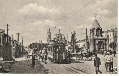 Житомир трамвай 1910.jpg: житомирський трамвай